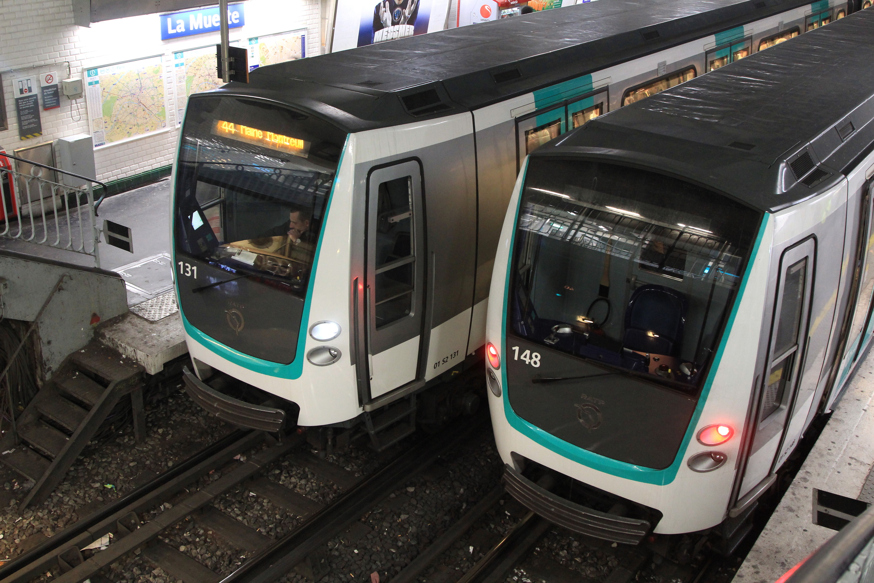 Deux MF 2000 à quai à la station La Muette du métro de Paris.